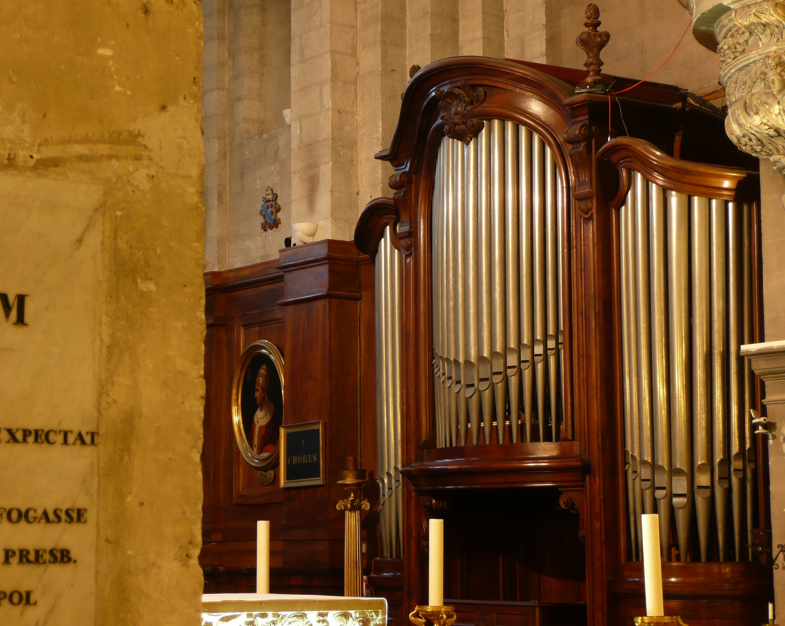 Avignon (Vaucluse, France), dans la métropole Notre-Dame des Doms, orgue de chœur construit en 1902, après le rachat de la maison Cavaillé-Coll par Charles Mutin qui avait fait auprès du grand Aristide tout son apprentissage.